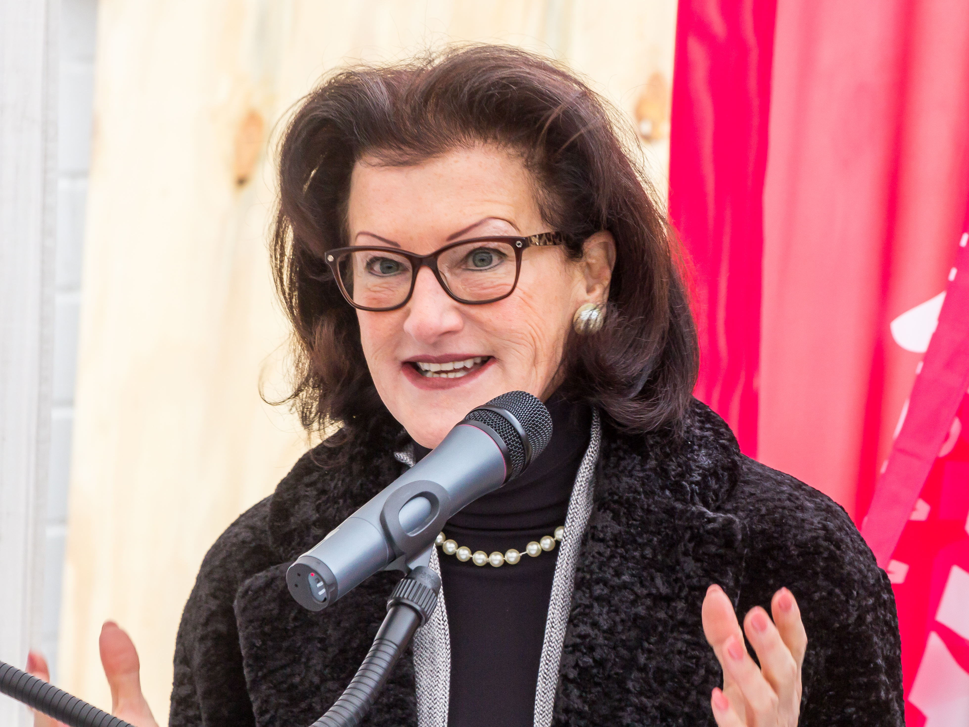 Restaurierung römische Wasserleitung aus Hürth Foto: Ansprache durch Gisela Walsken, Regierungspräsidentin im Regierungsbezirk Köln